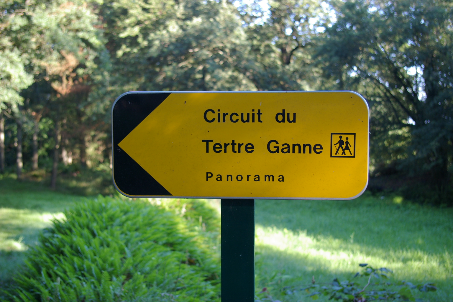 Site du tertre Ganne Randonnées